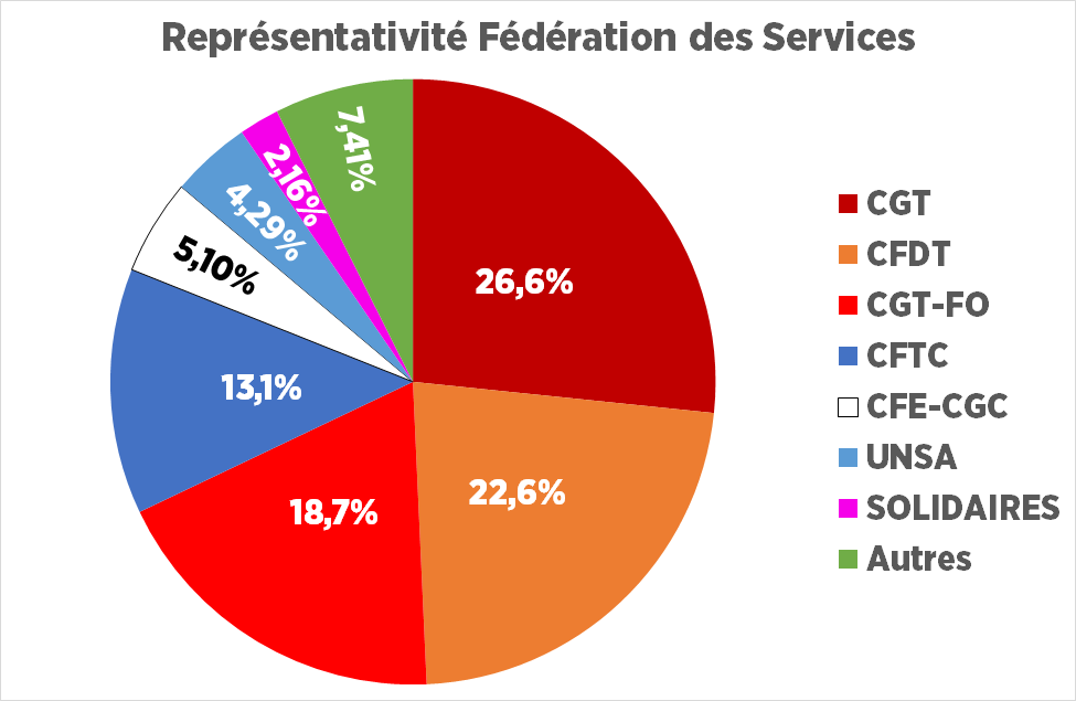 Représentativité des organisations syndicales mesurée par les élections du comité d'entreprise ou des délégués du personnels, des TPE et des salariés du particuliers